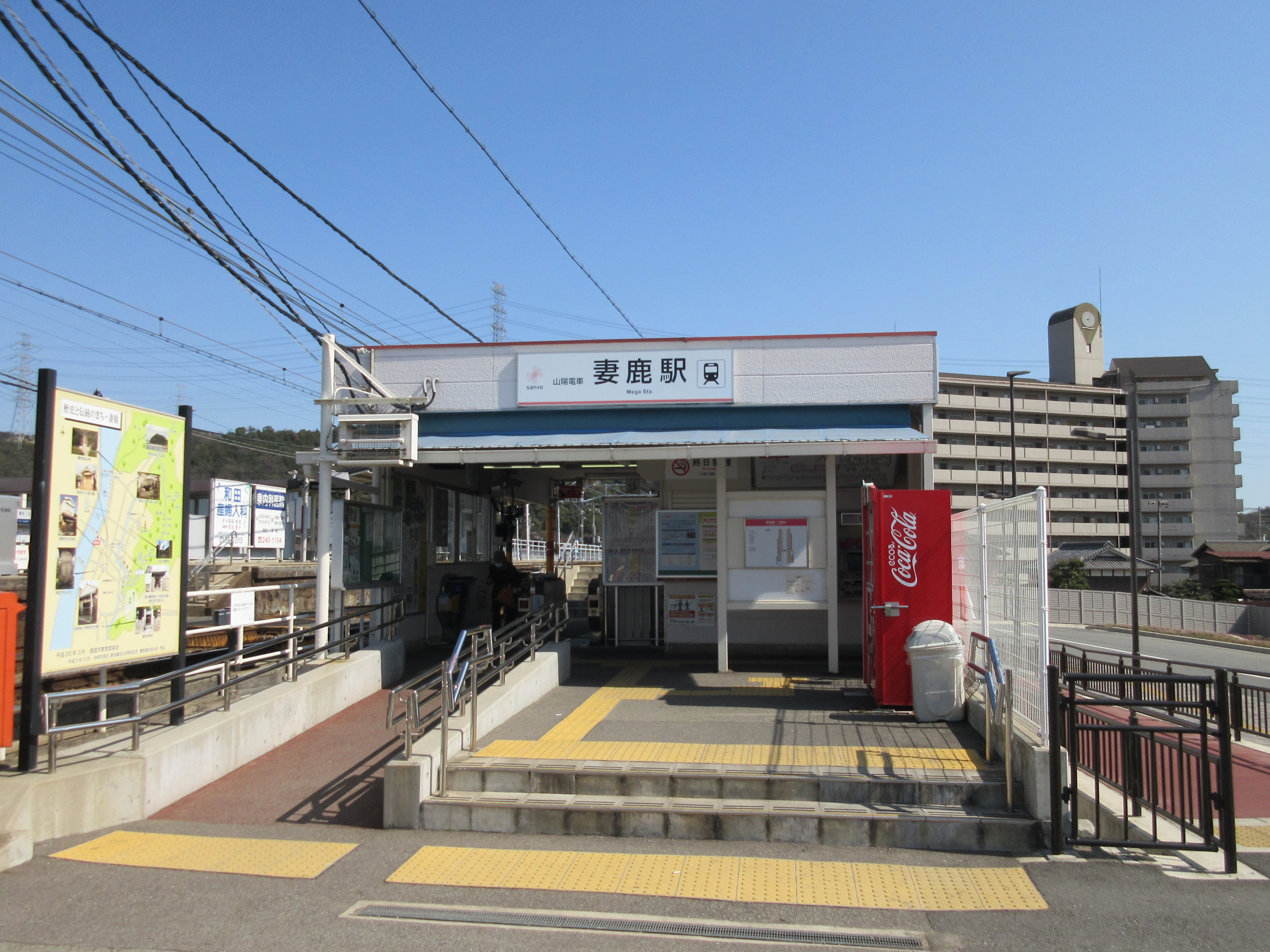 山陽電鉄妻鹿駅